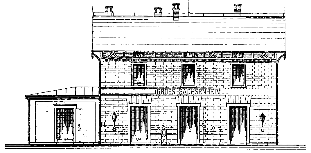 Zeichnung des Bahnhofs Sachsenheim, Gleisseite.